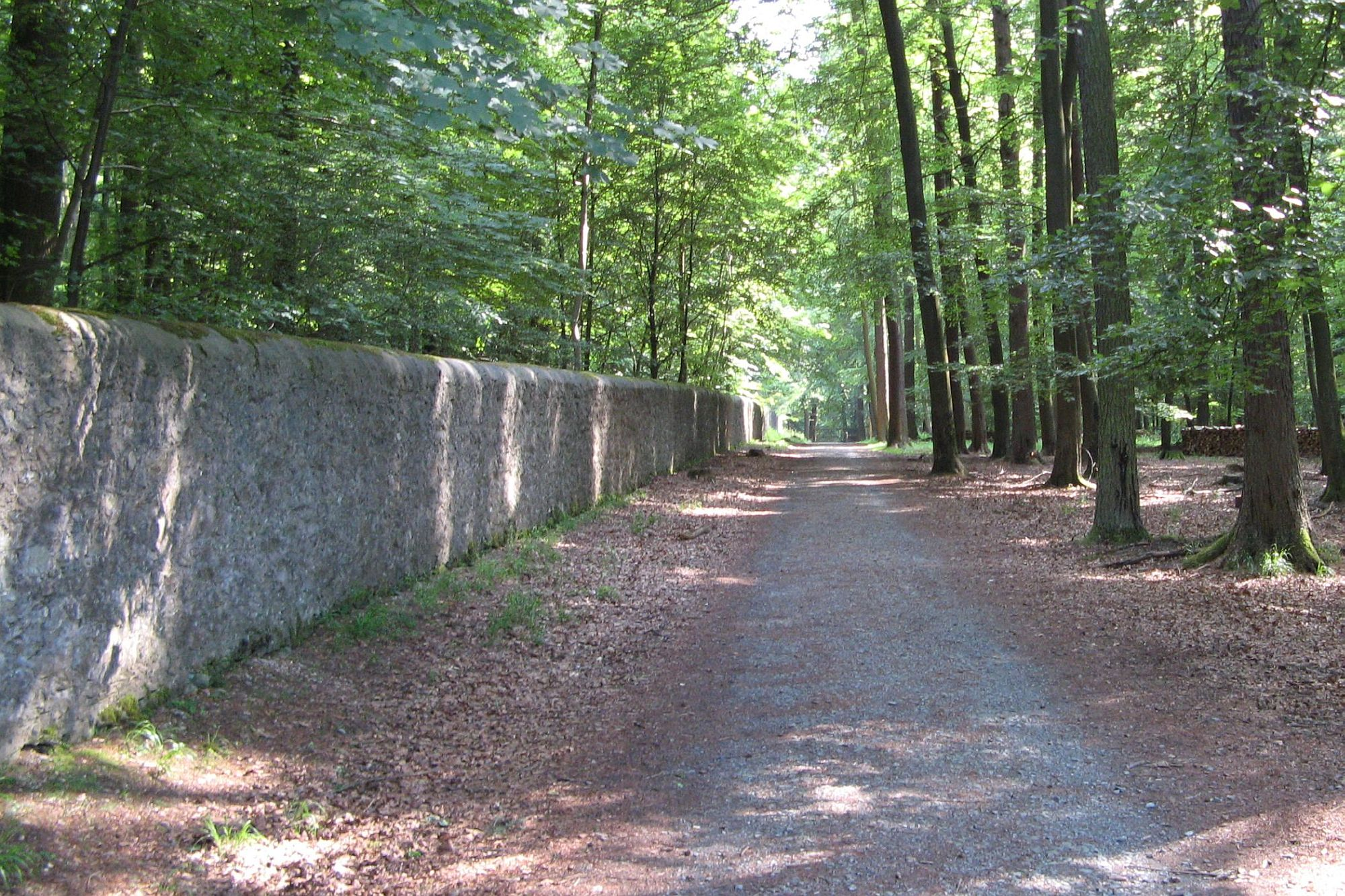 Steinerne Außenmauer des Tiergarten Weilburg